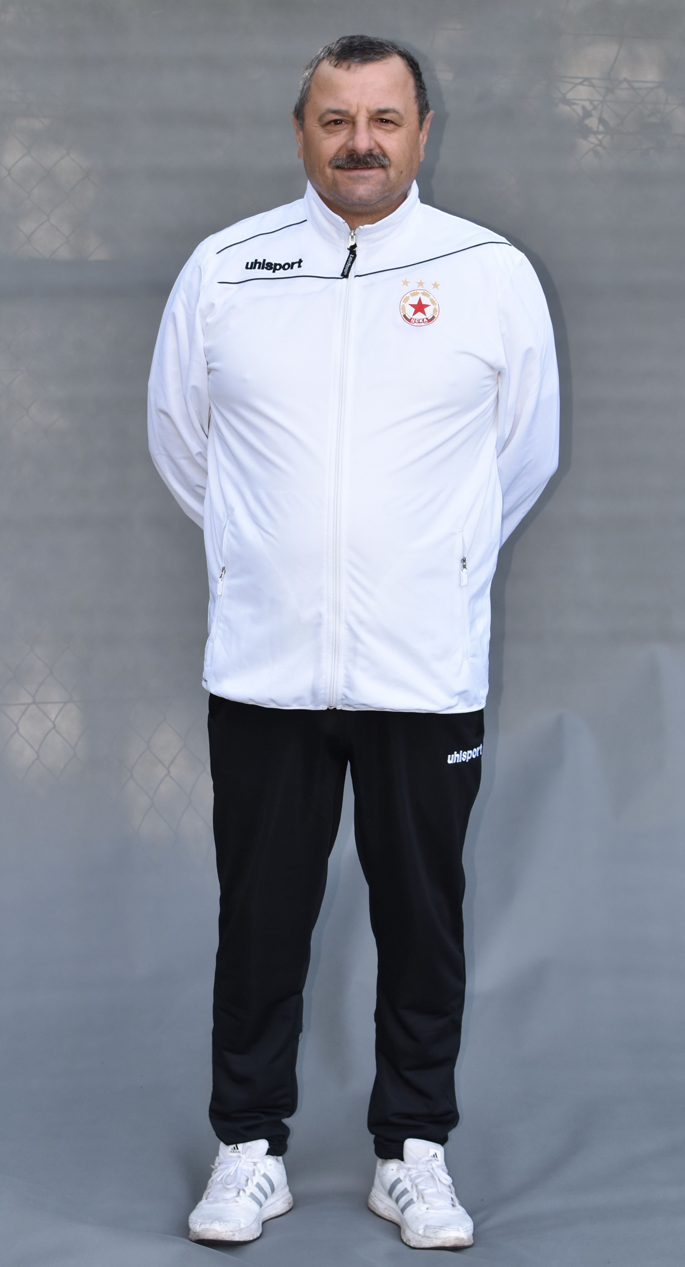 Стефан Яръмов